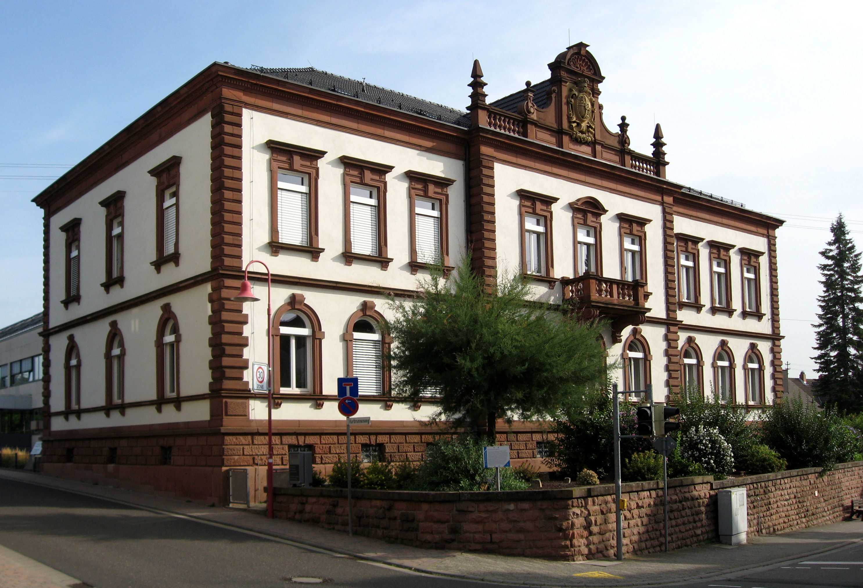 ehemaliges bayerisches Amtsgericht, Luitpoldstraße 33 in Edenkoben; jetzt Fachhochschule für Finanzen; breitgelagerter Bau, Neurenaissance, um 1880